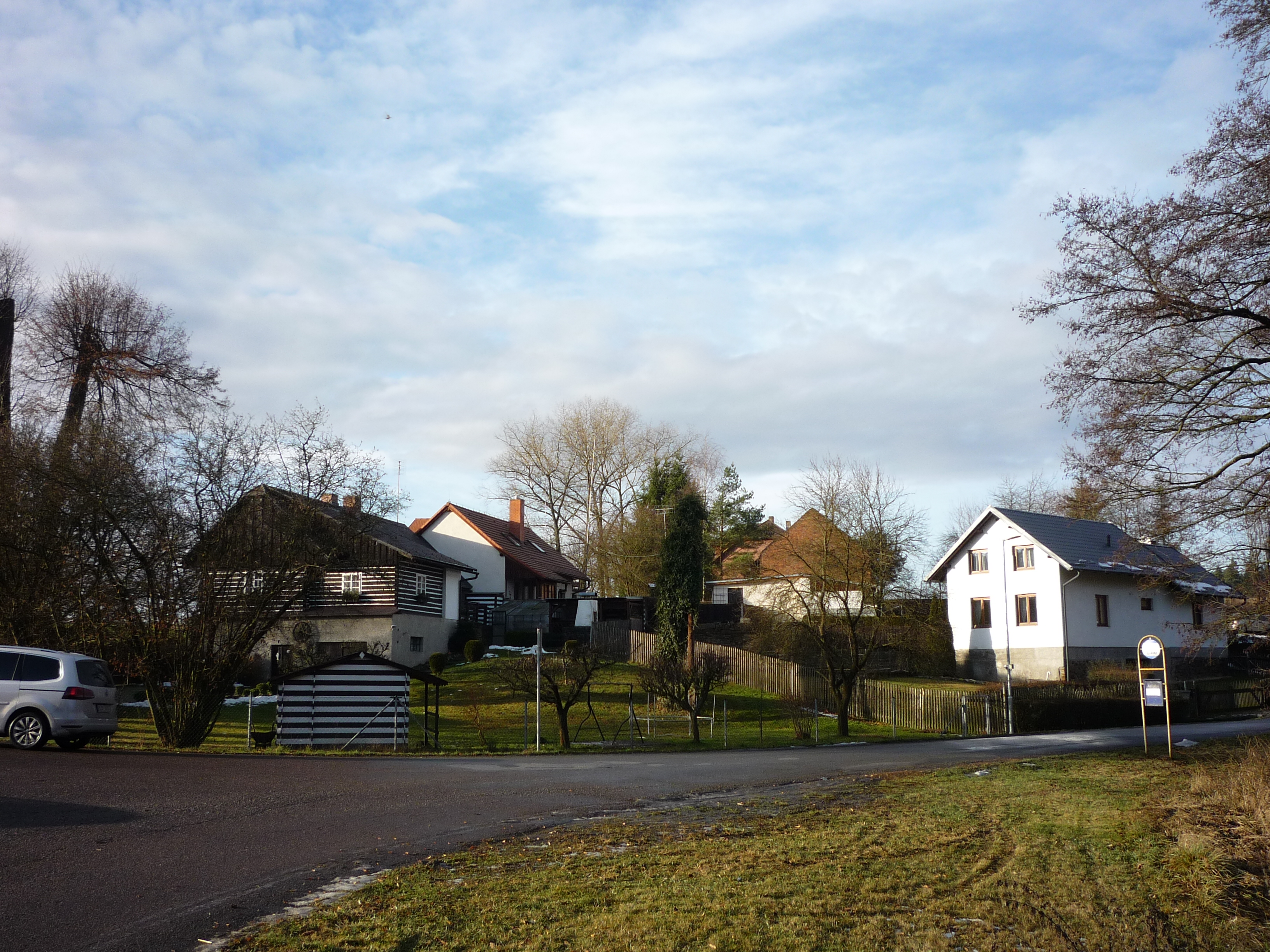 Autor fotografie Jiří Zelenka. Rouštány část obce Pohled. Silnice do obce Ždírec. Roubenka chráněná kulturní památka a její okolí jako z knihy Josefa Jahody. Obec Pohled. Okr.Havlíčkův Brod. Kraj Vysočina. Czech Republik.